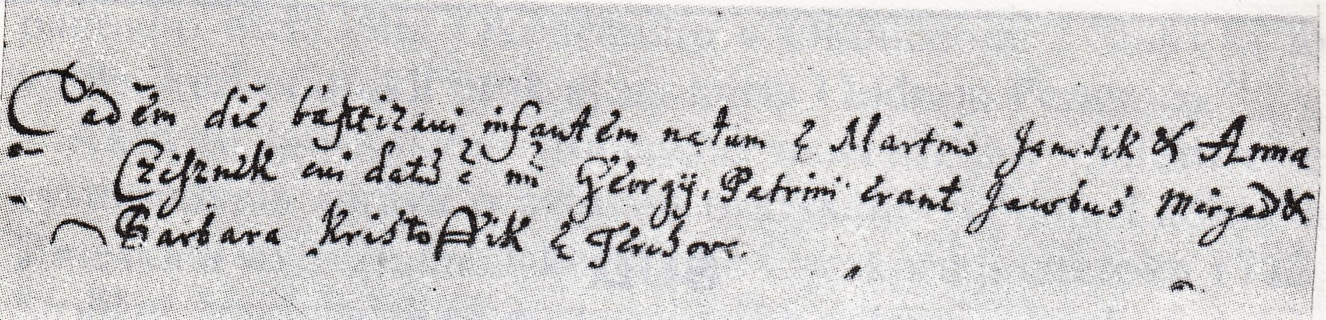 Záznam z farskej matriky vo Varíne o pokrstení Juraja Jánošíka 25. januára 1688. „Eadem die baptizavi infantem natum de Martin Janosik et Anna Czesznek cui datum est nomen Georgii. Patrini erant Jacobus Mergad et Barbara Kristofik de Terchova“. (Dňa 25. tohože mesiaca som pokrstil dieťa narodené z Martina Jánošíka a Anny Cesnekovej, ktorému je dané meno Juraj. Krstní rodičia boli Jakub Meriad a Barbora Krištofíková z Terchovej).Záznam je v latinčine. O dátum narodenia tohto slovenského zbojníka sa sporia historici, ktorí uvádzajú ešte jeden dátum a to 16. máj 1688. Nie je spoľahlivo dokázaný skutočný dátum jeho krstu.